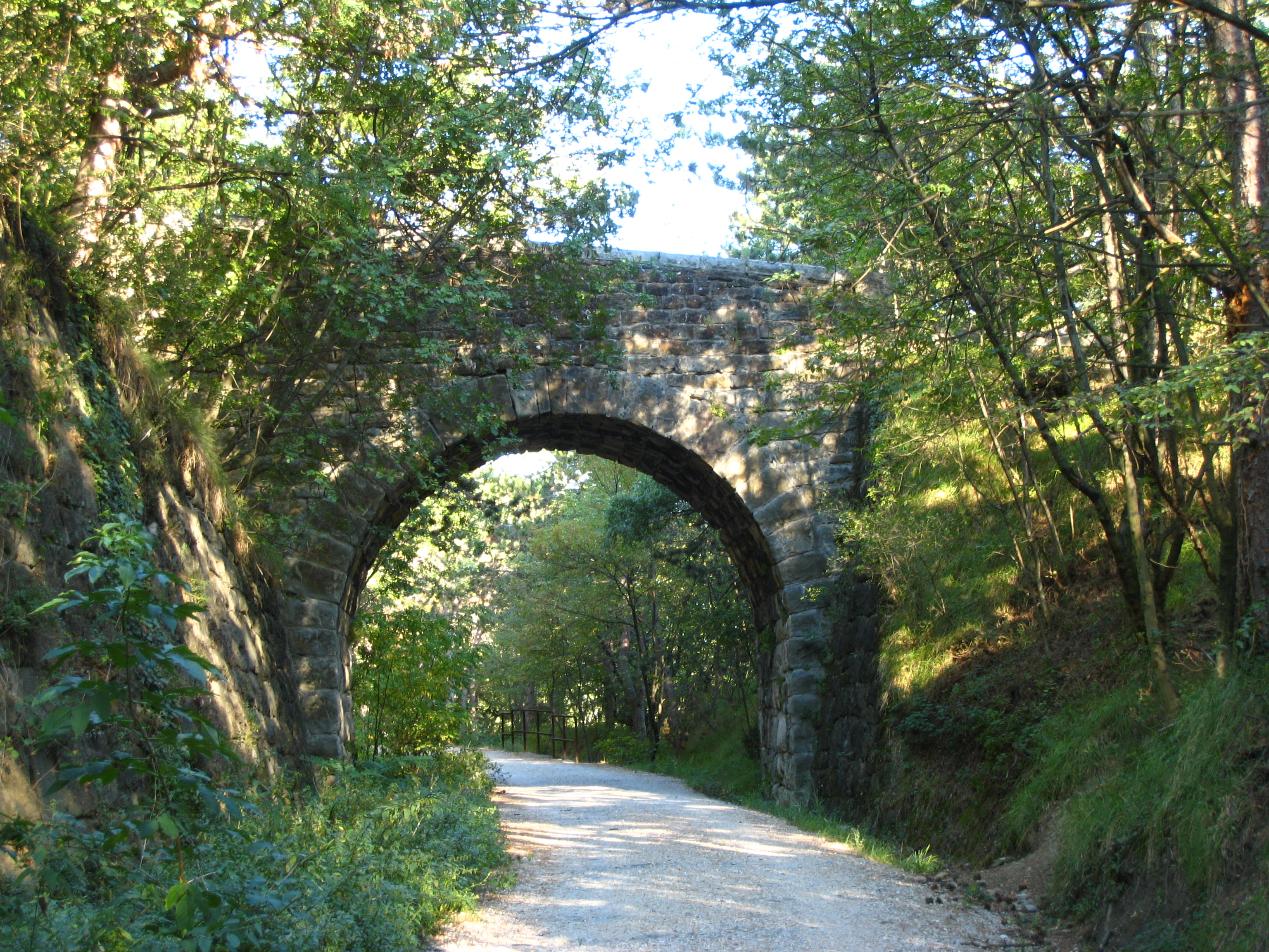 Sentiero panoramico della Val Rosandra sul sedime della dismessa ferrovia Trieste-Erpelle